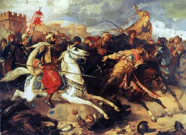 Stanislaw Chlebowski - Battle of Varna